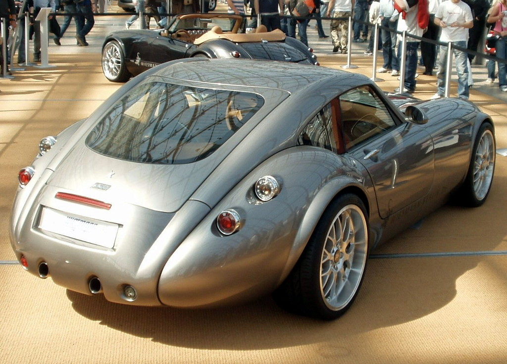 Wiesmann GT